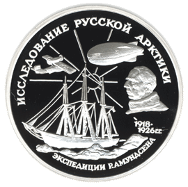 Монета Банка России — «Географическая серия», Исследование Русской Арктики, 3 рубля, реверс